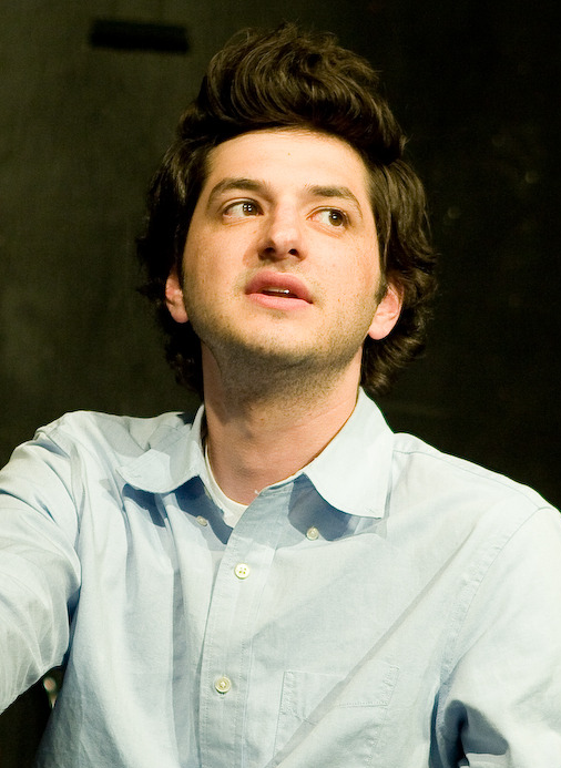 KILL SCREEN - UCB CAGEMATCH SNAPKIN VS KILL SCREEN